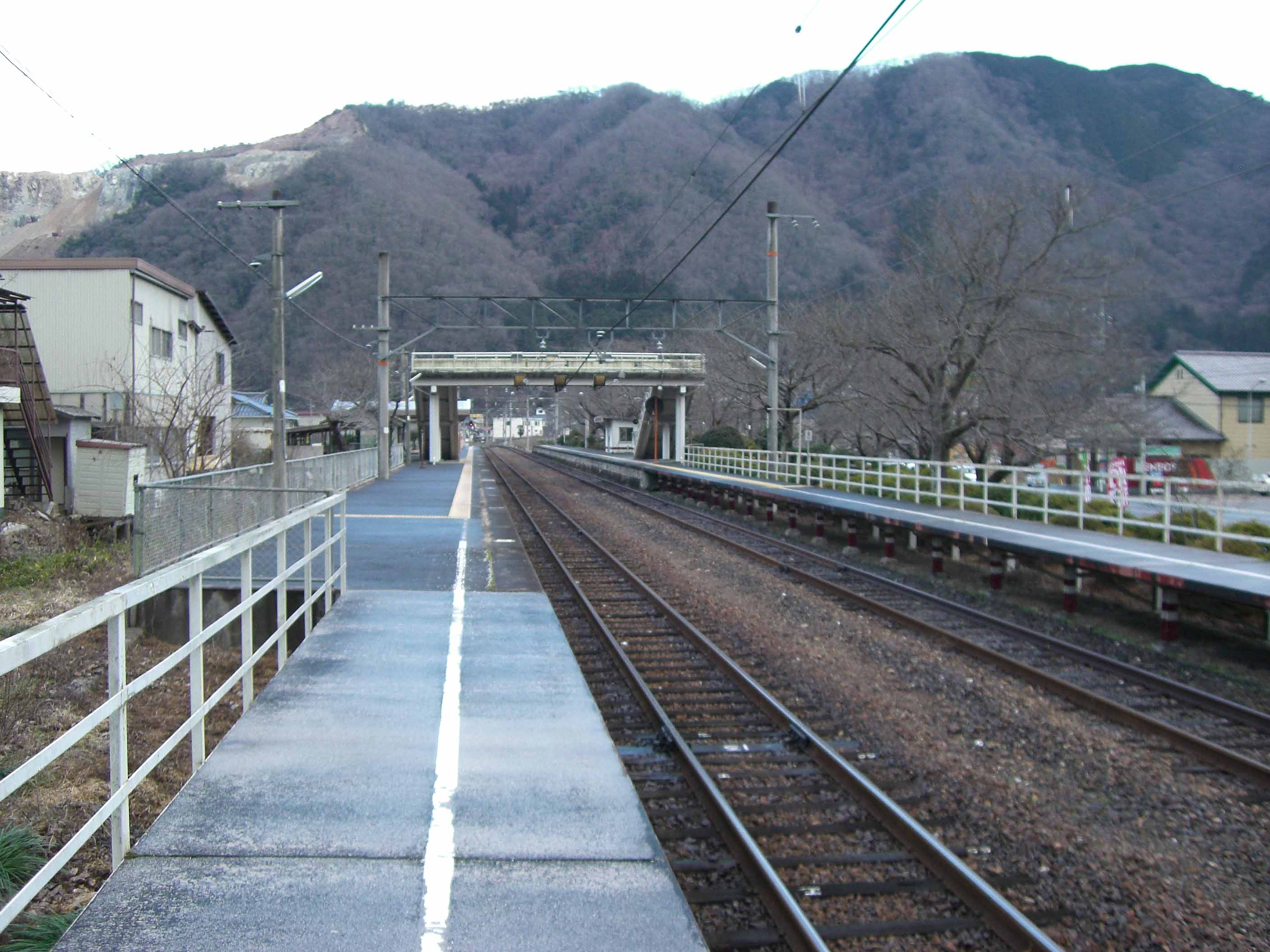 木野山駅の構内